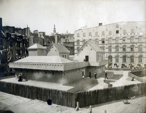 Reproduction de l'Habitation de Québec lors du tricentenaire de la ville en 1908. Vue de la rue Dalhousie À l'arrière-plan,à droite, la maison Thibaudeau